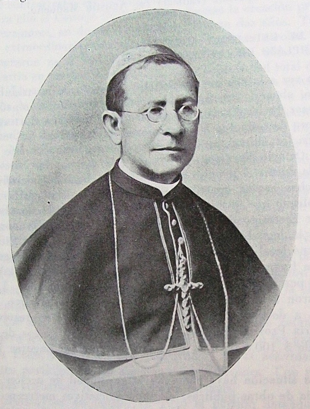 Bernabé Piedrabuena